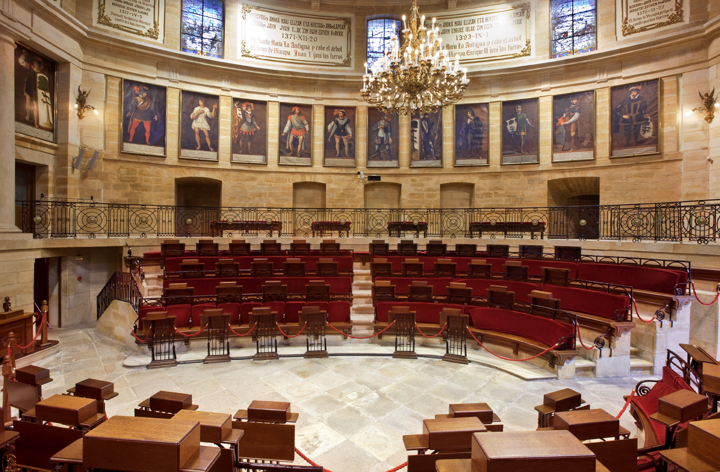 Salón de plenos de la Casa de Juntas